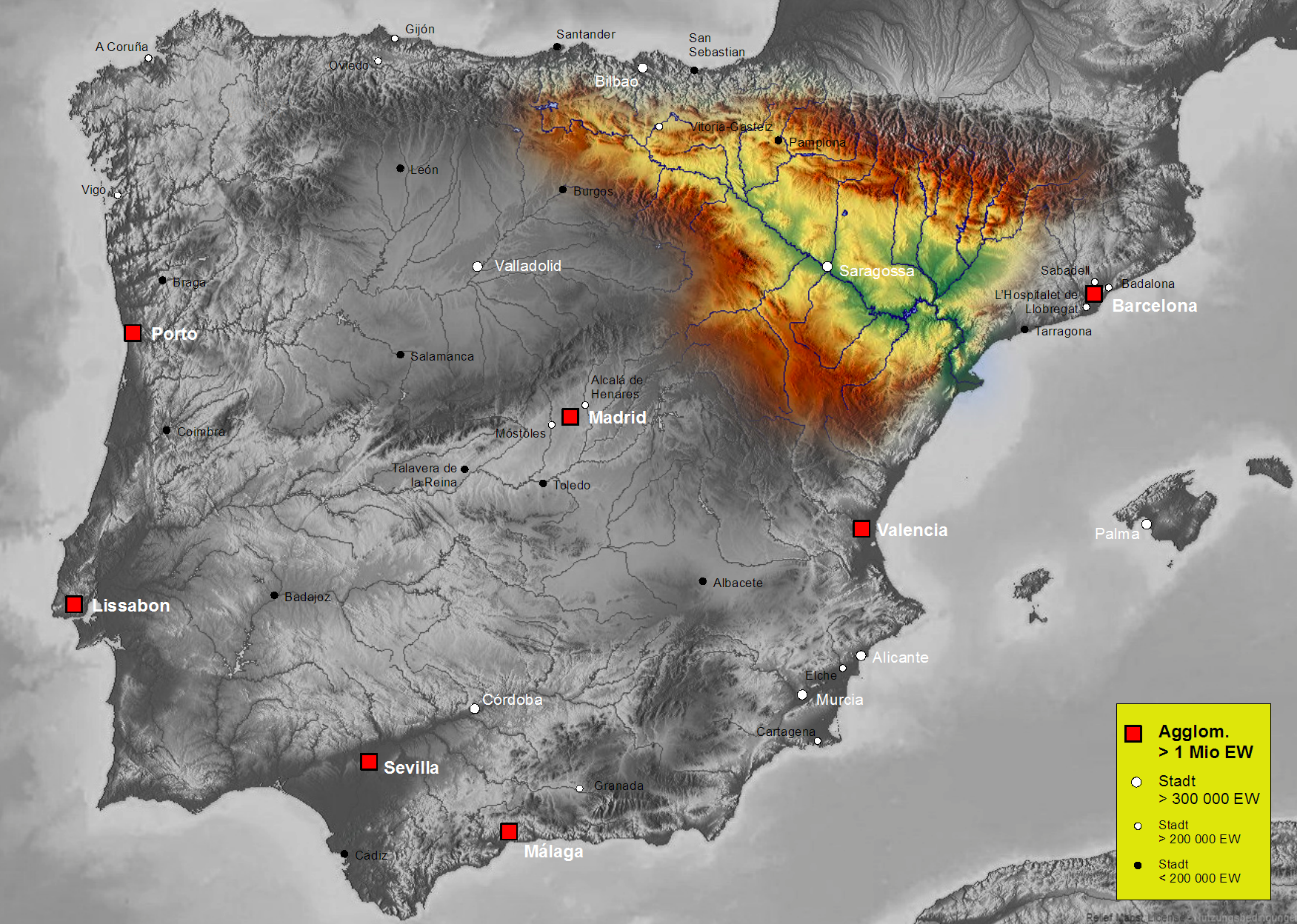 Map of Ebro river basin in Spain, Karte des hydrogeografischen Beckens des Ebro